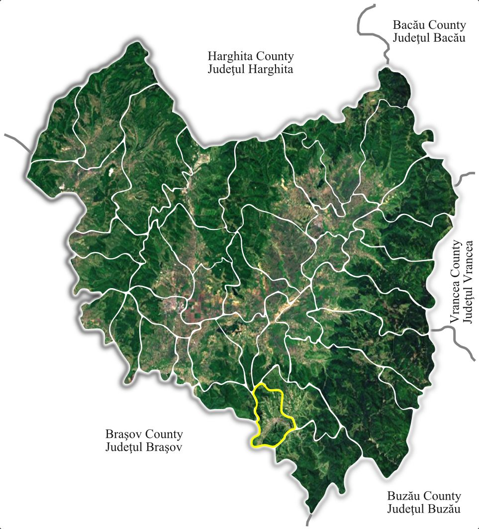 Intorsatura Buzaului jud Covasna